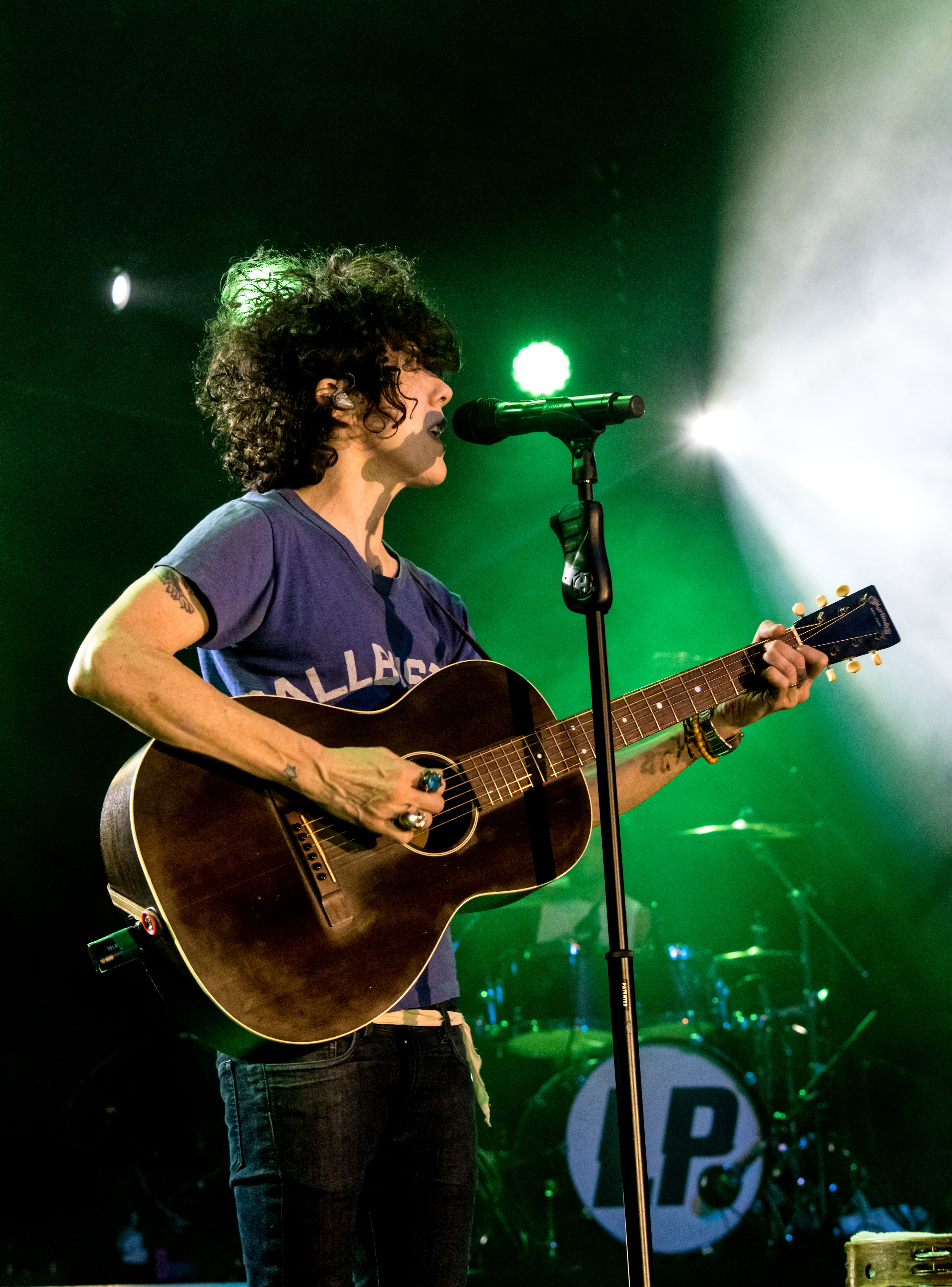 Bilder vom Zelt Musik Festival 2018 in Freiburg im Breisgau LP am 28.07.2018 im Zirkuszelt